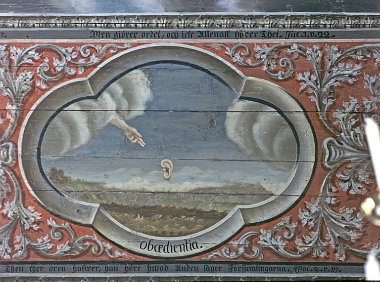 Målning; Lydnaden. Symboliserad av ett svävande öra. 1793 J.M. Hultgren Motiv: Surteby-Kattunga, Surteby kyrka Kategori: (02) Interiörer, detaljer, (03) Målningar på trä Målning; Lydnaden. Symboliserad av ett svävande öra. 1793 J.M. Hultgren.